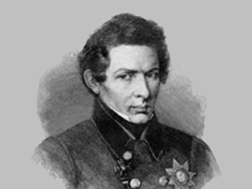 Портрет Н. И. Лобачевского.